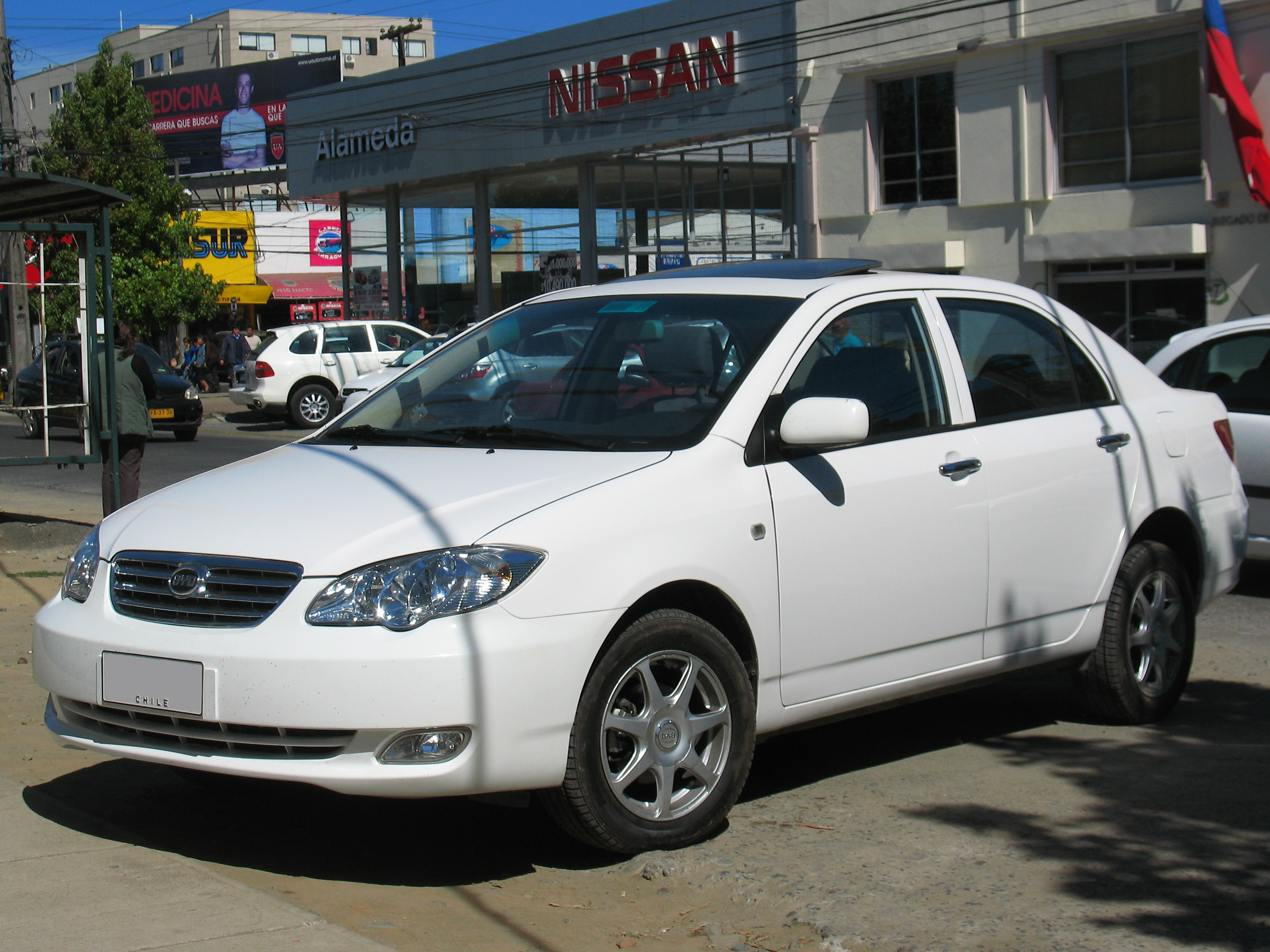 BYD F3 GLX-i 2011